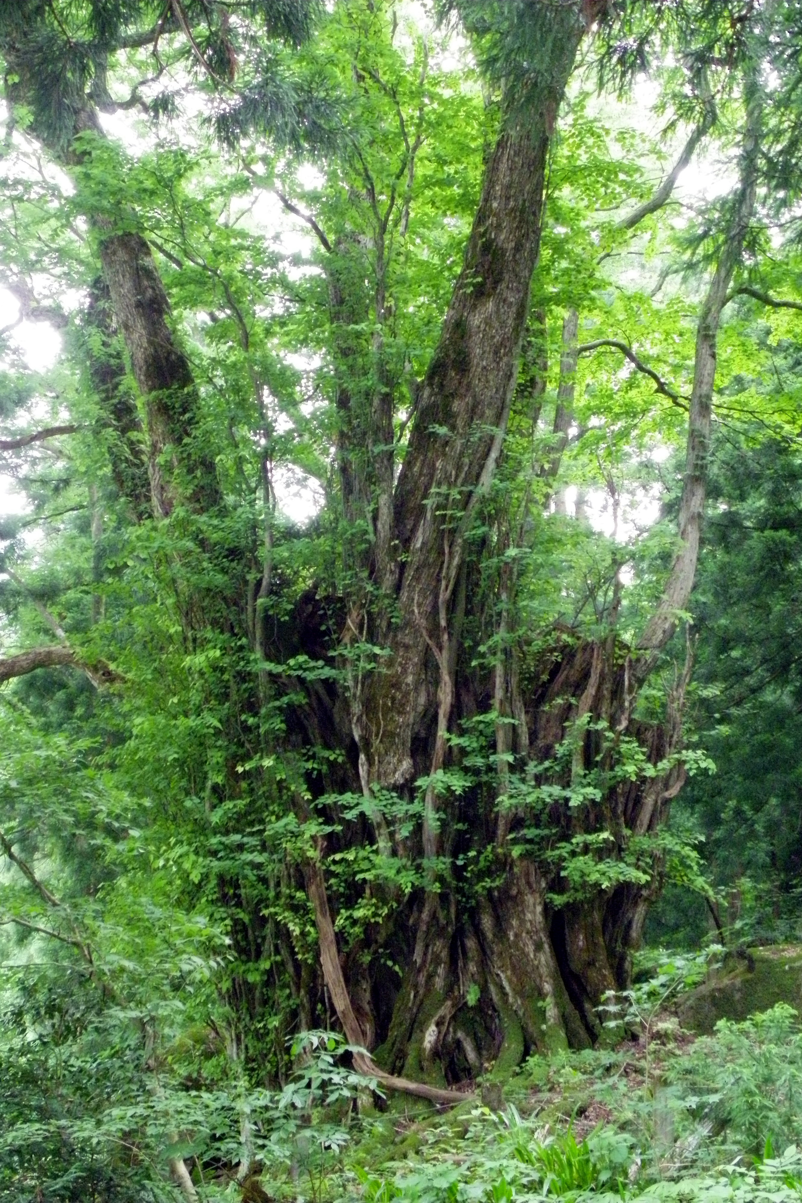 白山神社のカツラ（福井県最大の木）